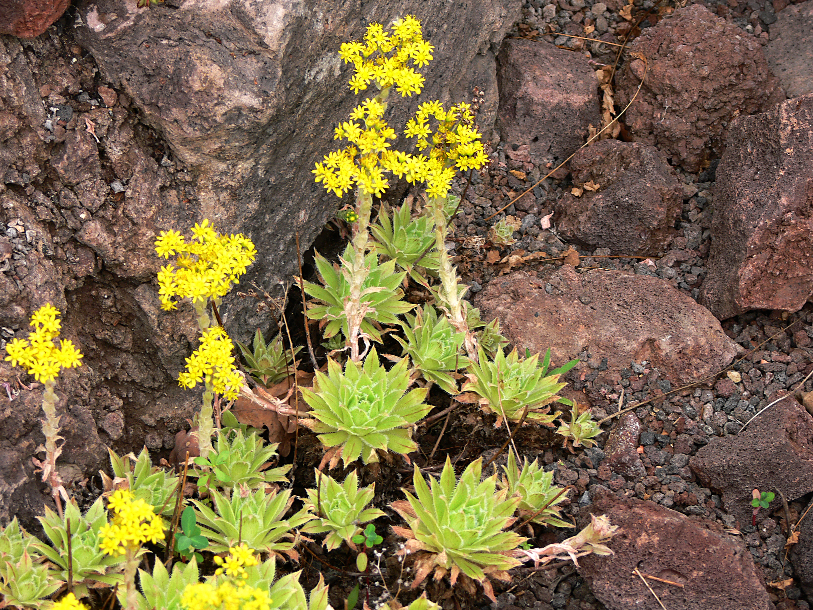 Aeonium simsii (SWEET) STEARN, Botanischer Garten Krefeld